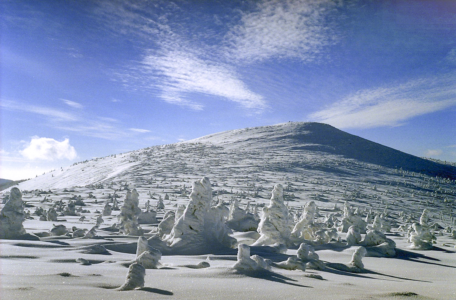 Karkonosze mountains in Poland, mount Mały Szyszak, view from Tępy Szczyt